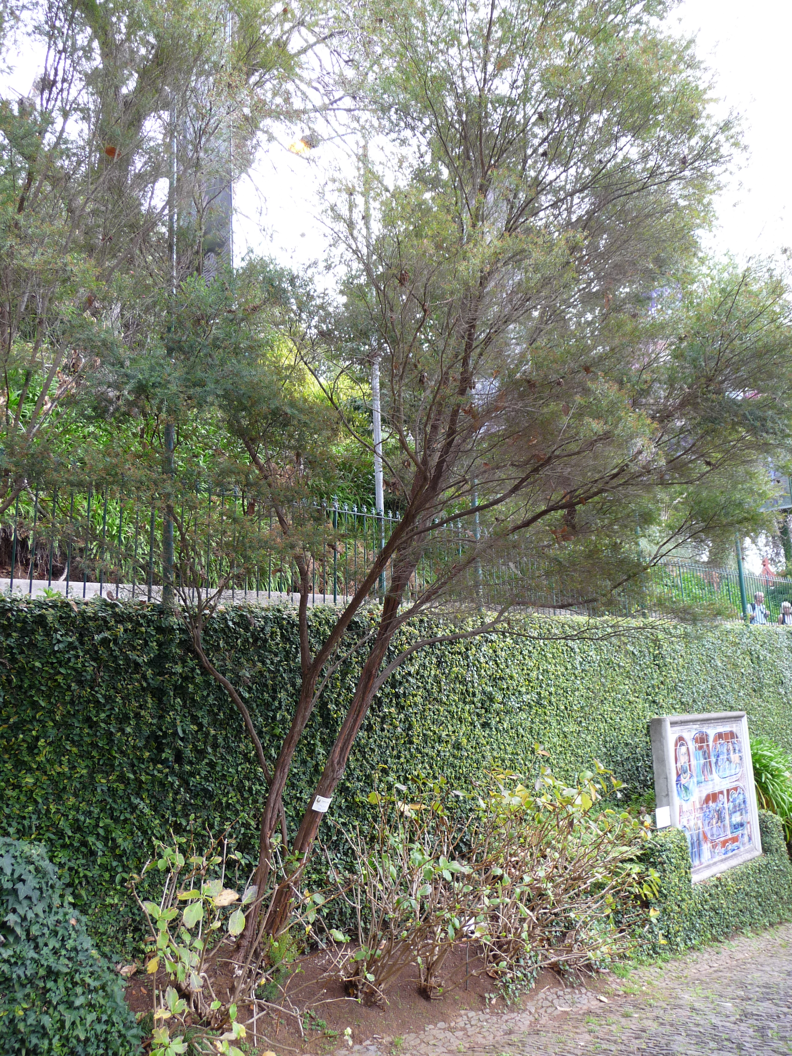 Baeckea virgata a Trópusi Kertben (Madeira, Monte)